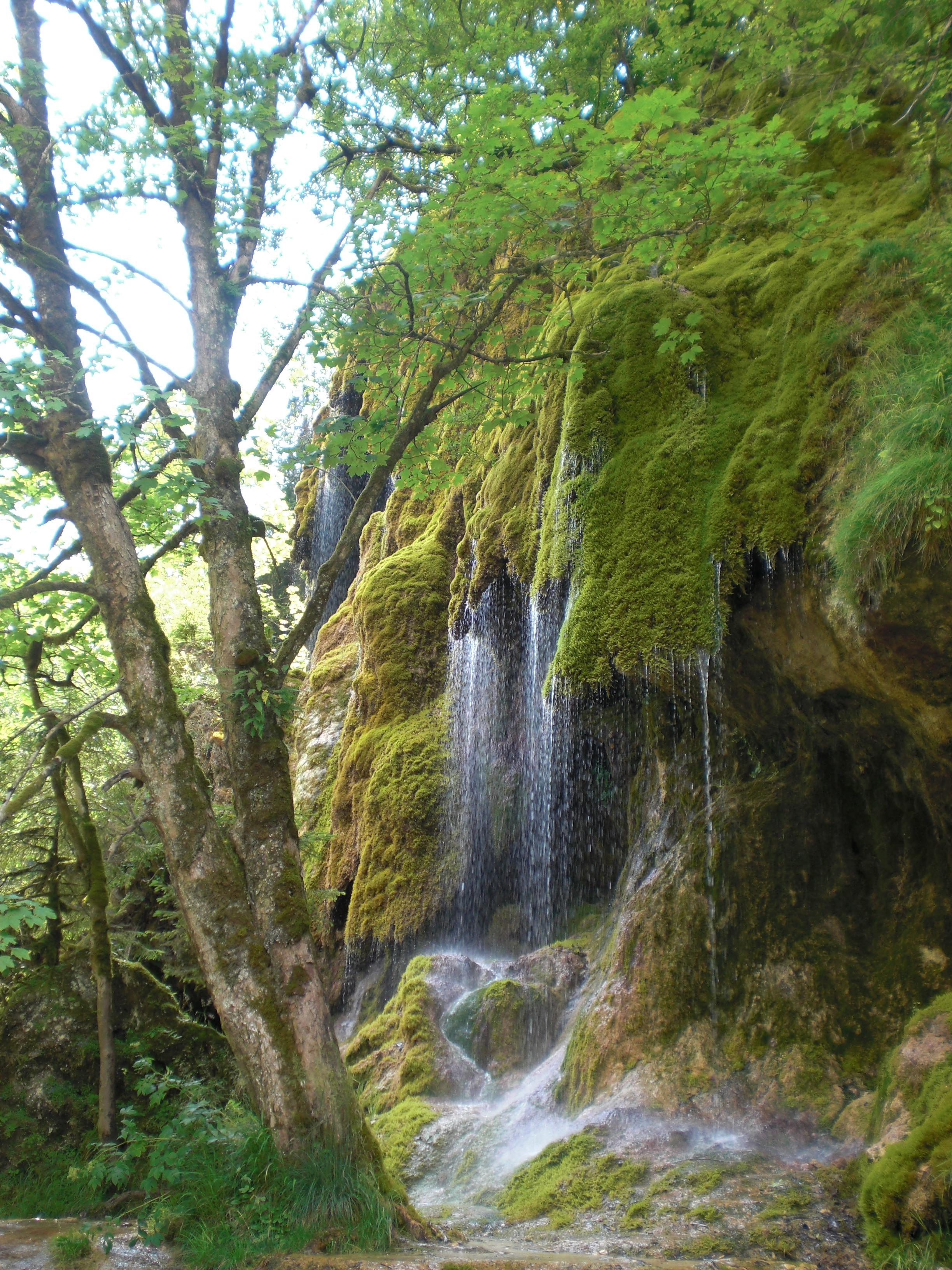 Die Schleierfälle am Oberlauf der Ammer (Bayern)